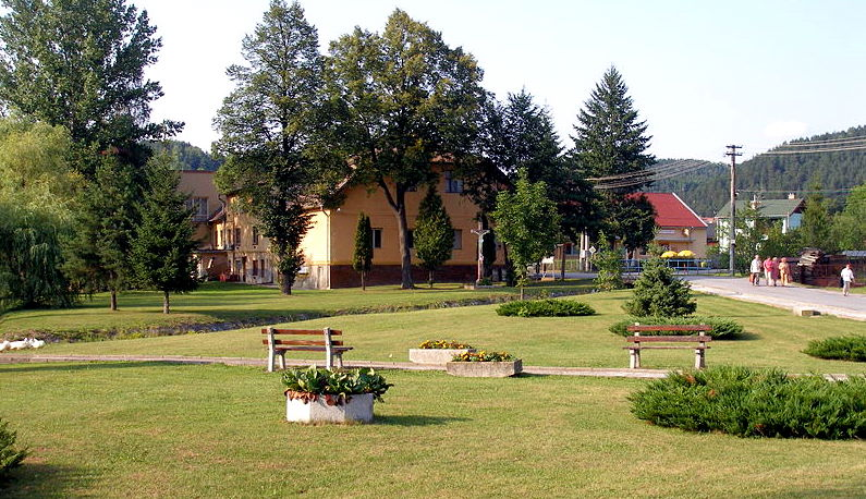 Pohľad na obec Sedlice stred dediny, okres Prešov región Šariš